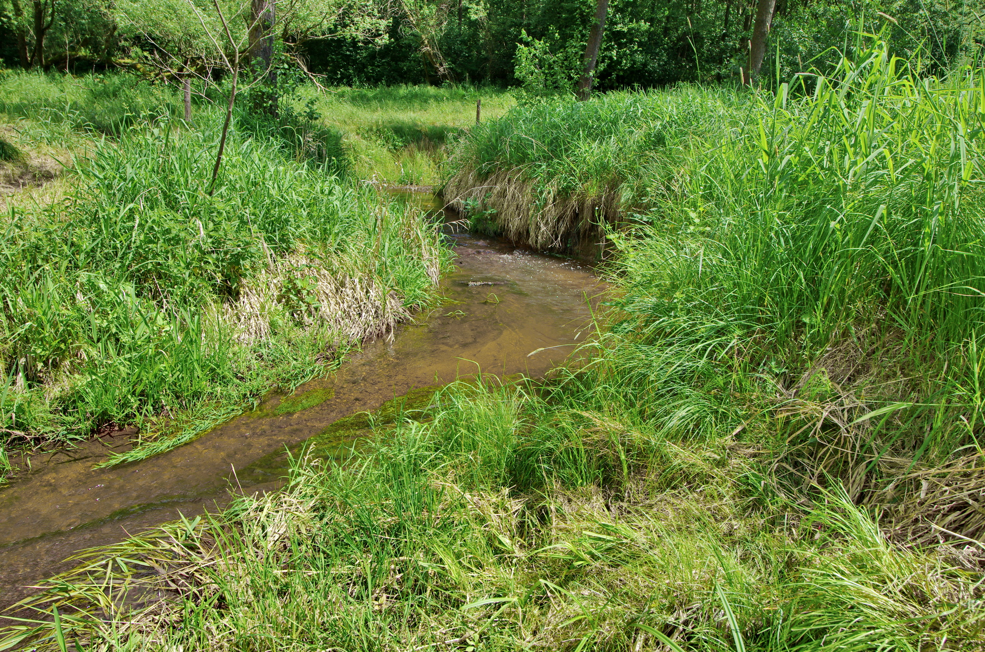 Salajna (Dolní Žandov), Šitbořský potok, okres Cheb